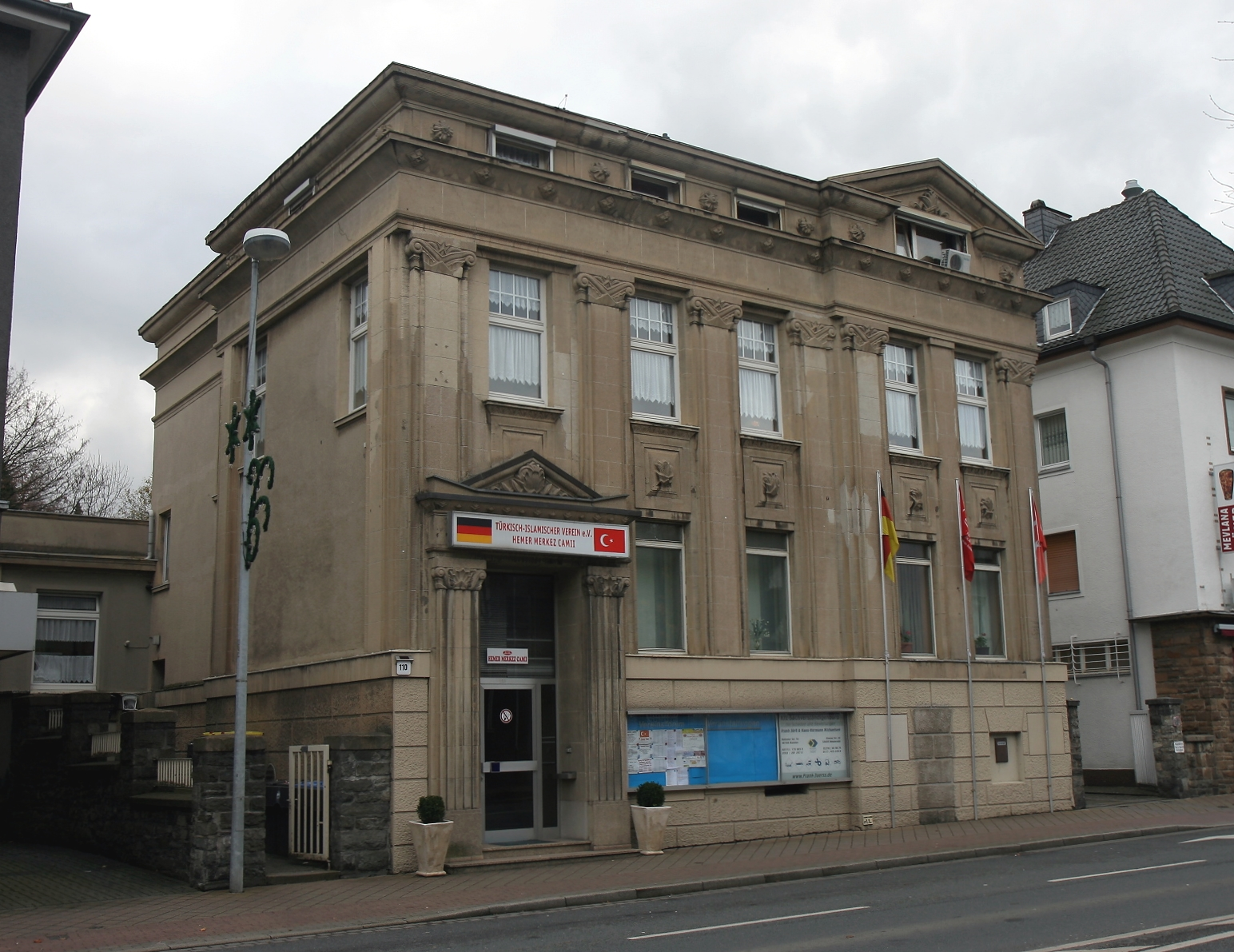 Gebäude in Hemer, Hauptstraße 110. Baudenkmal seit 2001.